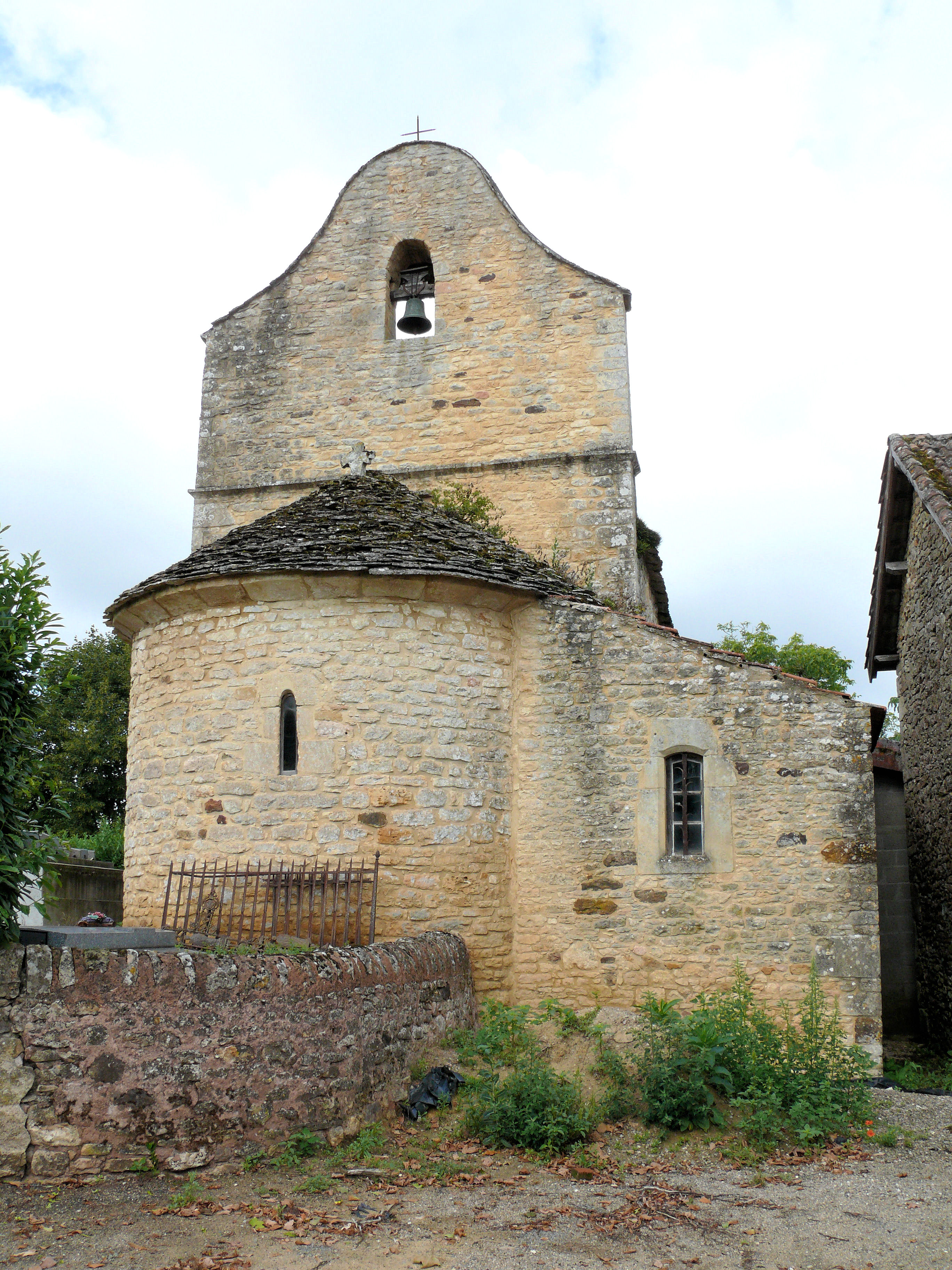 Villefranche-du-Périgord - Église de Saint-Étienne-des-Landes